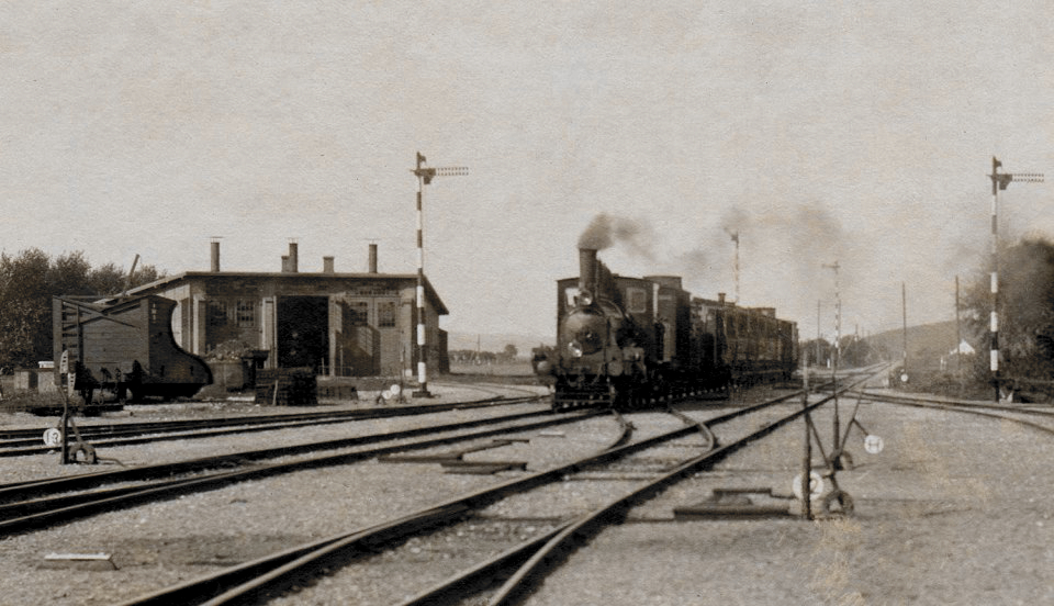 Ryomgard 1915